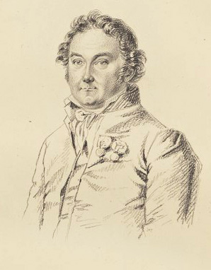 Danielsson, Anders (1784-1839)